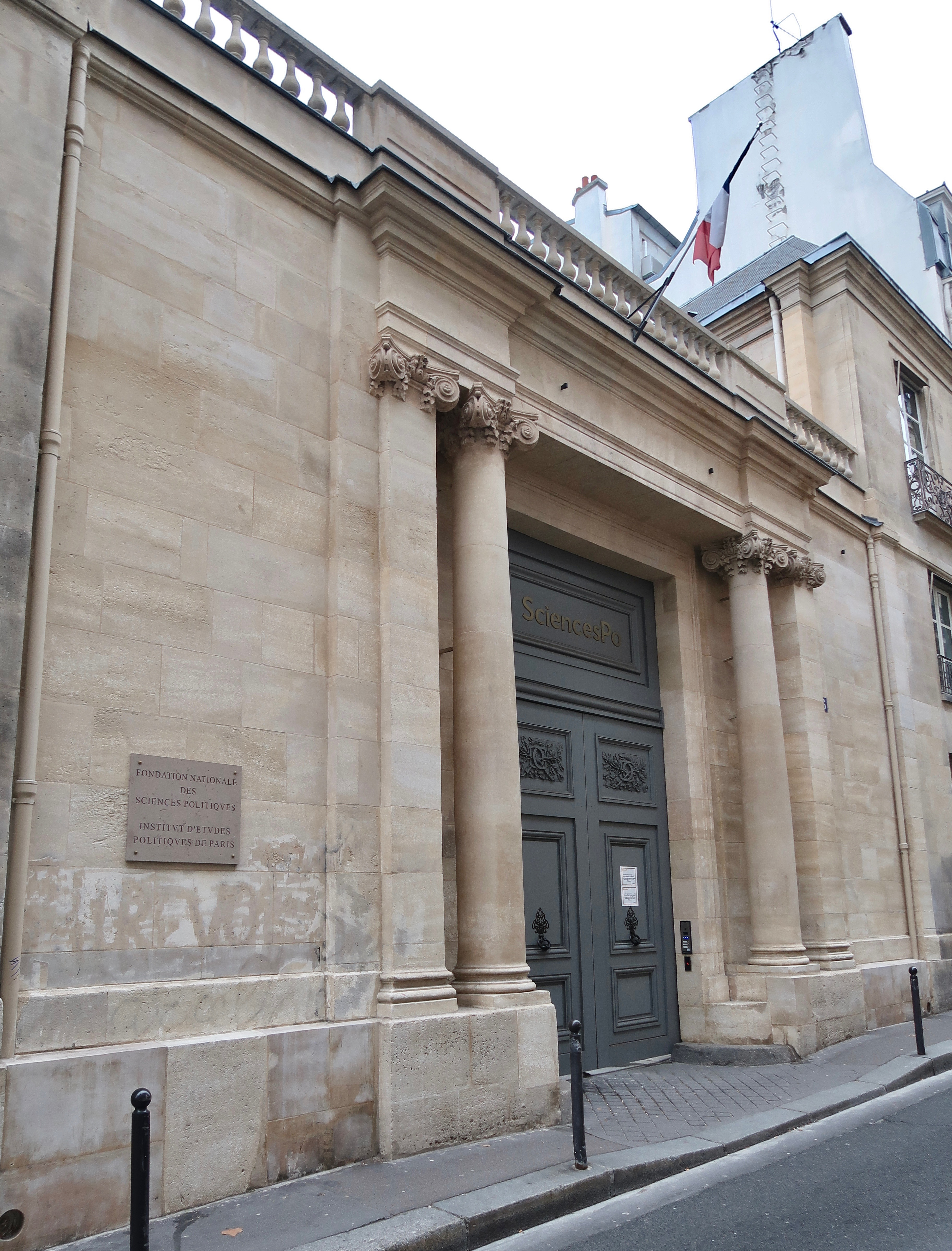 56 rue des Saint-Pères, Sciences-Po (Paris, 7e).